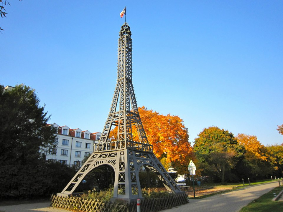 Miniatur-Eiffelturm am Centre Français de Berlin-Wedding